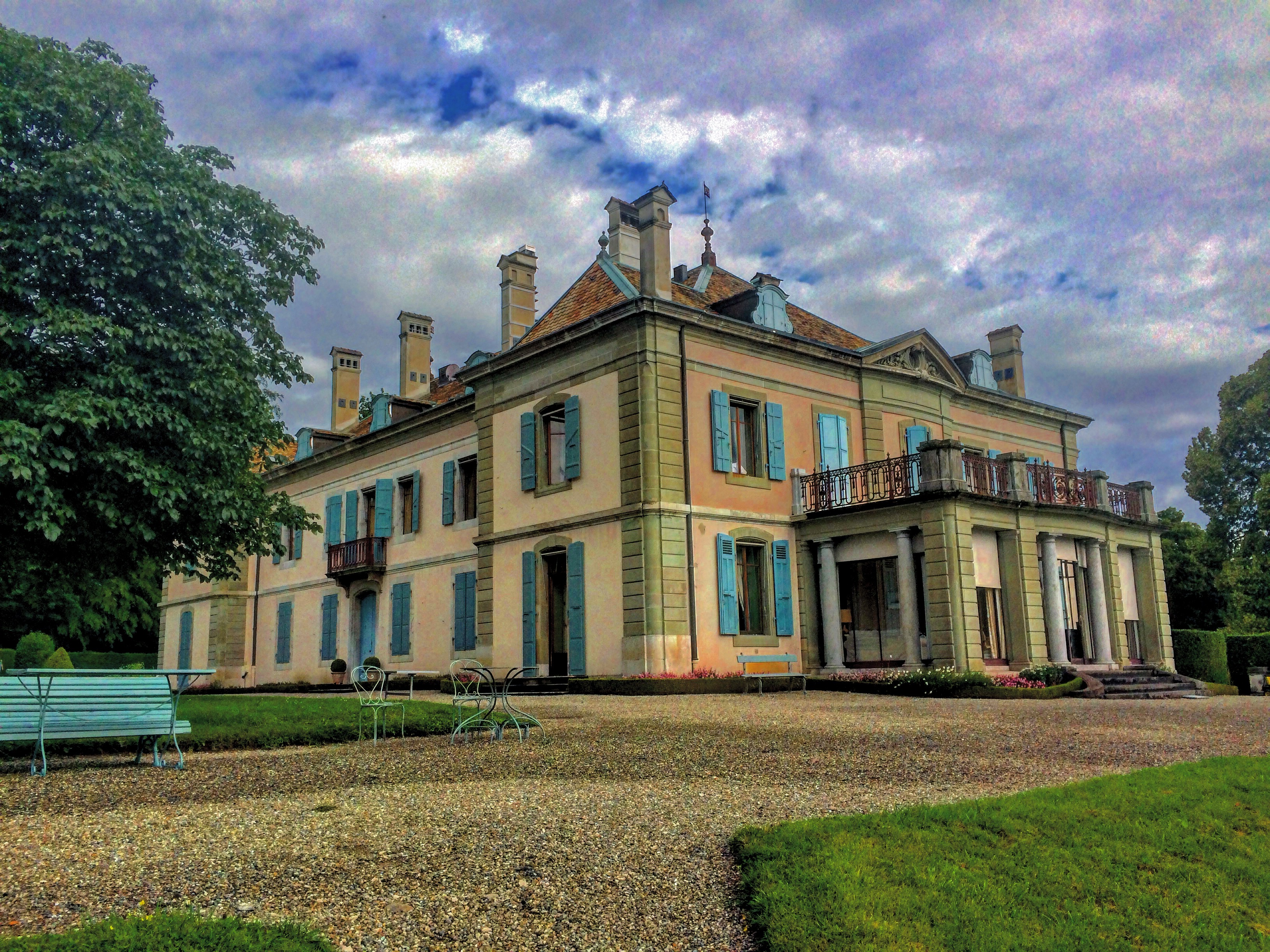 Les façades Est et Sud du château du Reposoir.